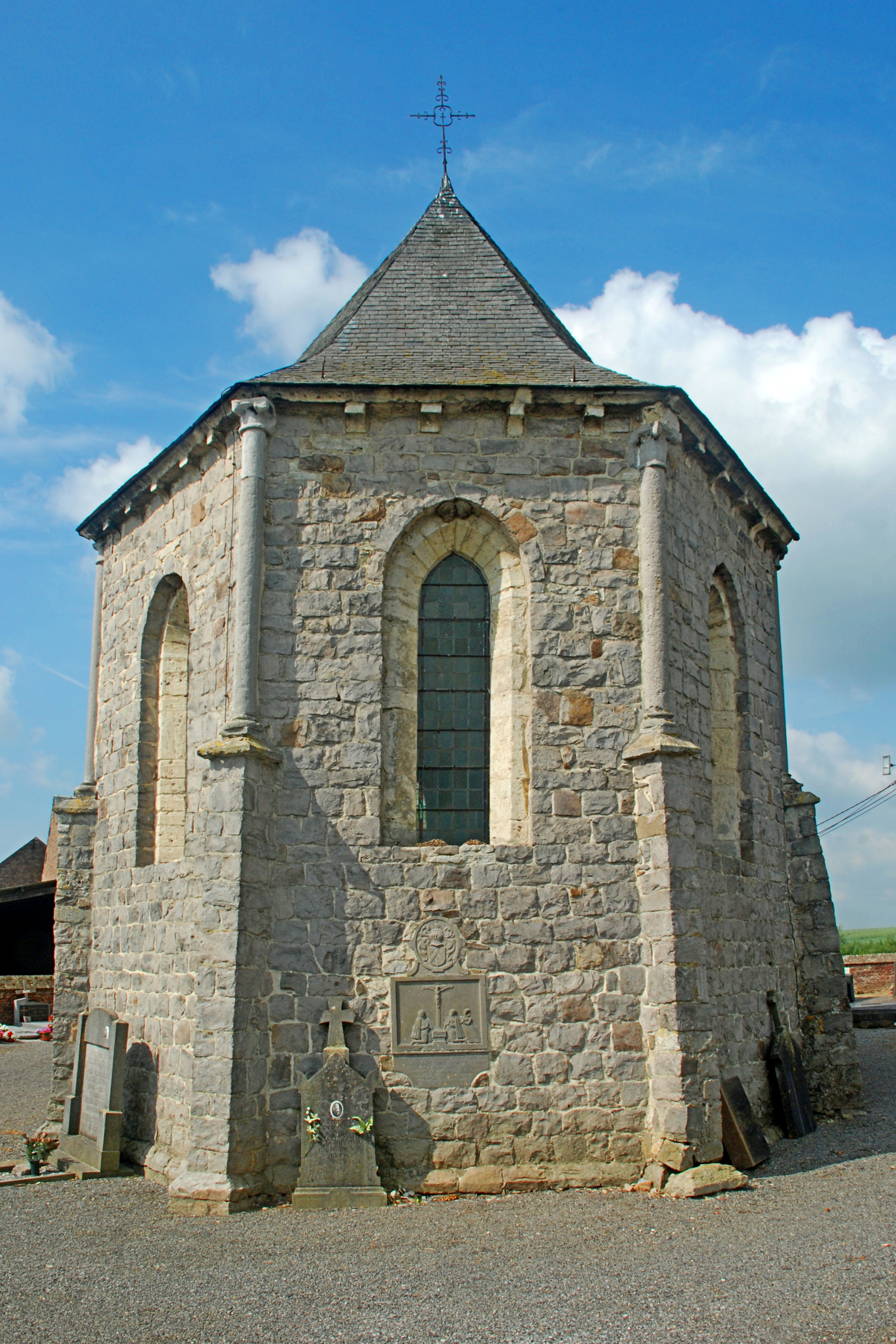 Belgique - Brabant wallon - Jodoigne - Piétrain - Chapelle Sainte-Catherine d'Herbais